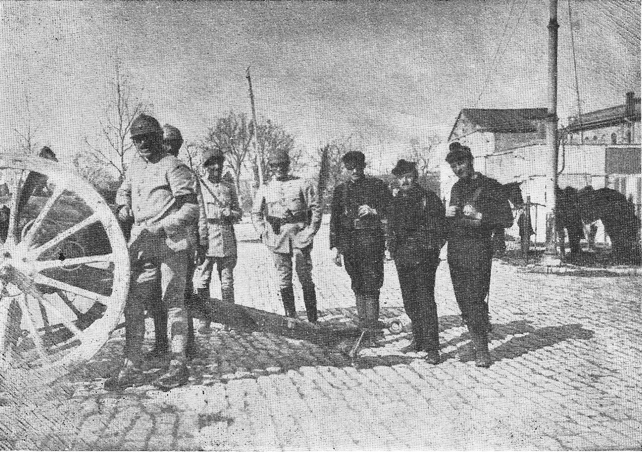 Le Crapouillot de Mai 1933 p50 les troupes françaises le 13 mars 1919 à Sébastopol photographie Rap .